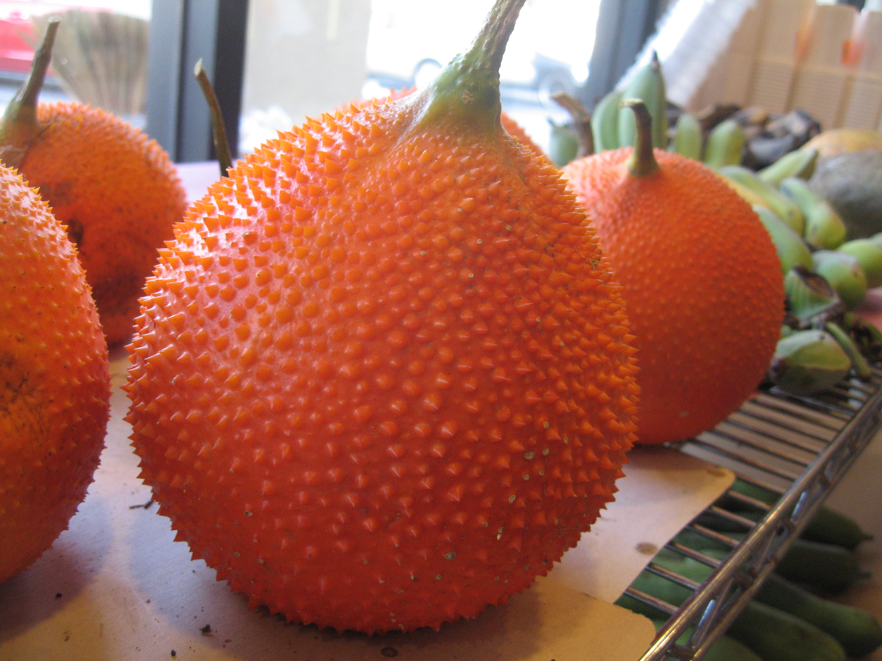 Momordica cochinchinensis.